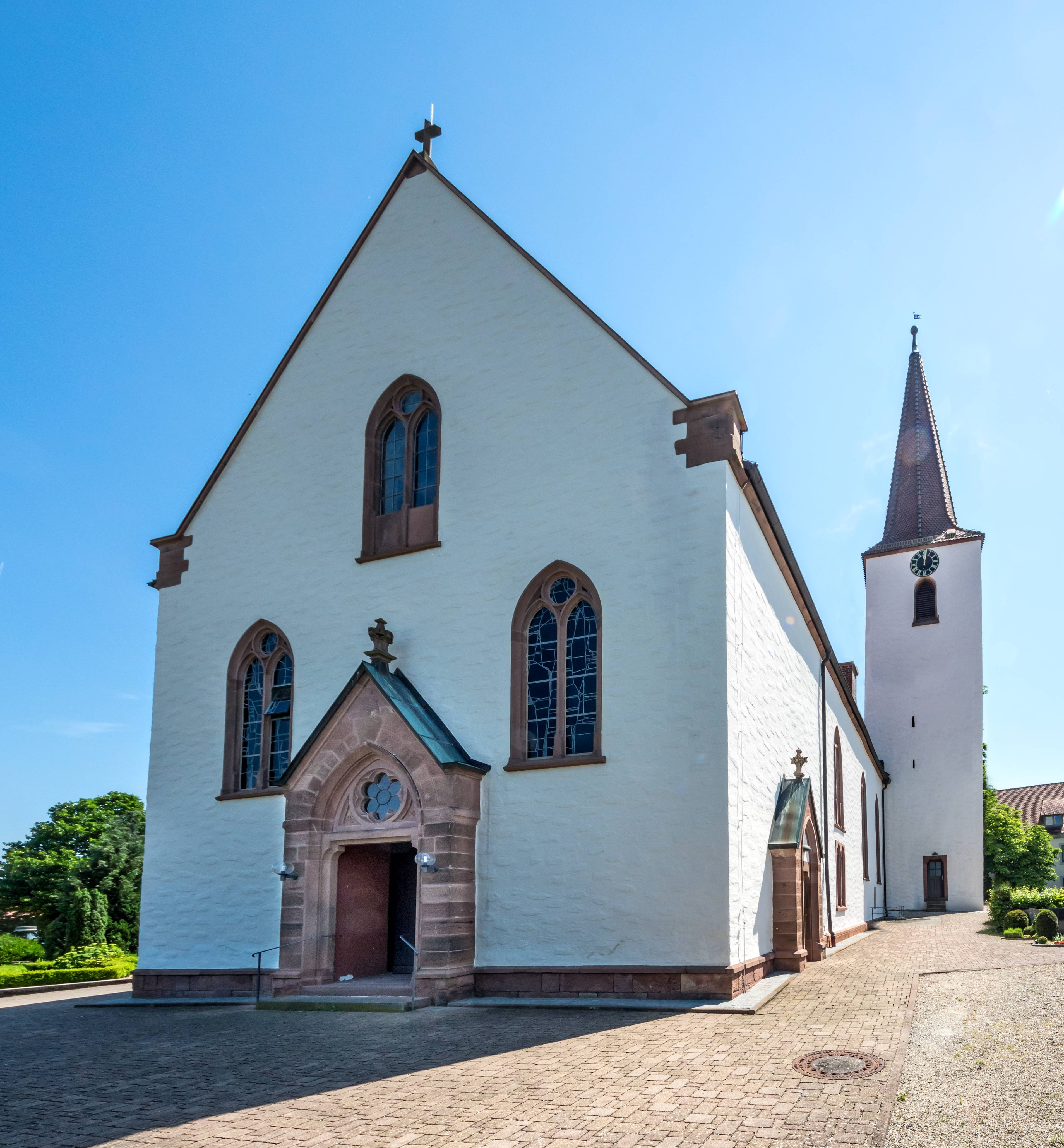 Bilder der evangelischen Kirche in Wolfenweiler Die Kirche von Westen mit Haupteingang